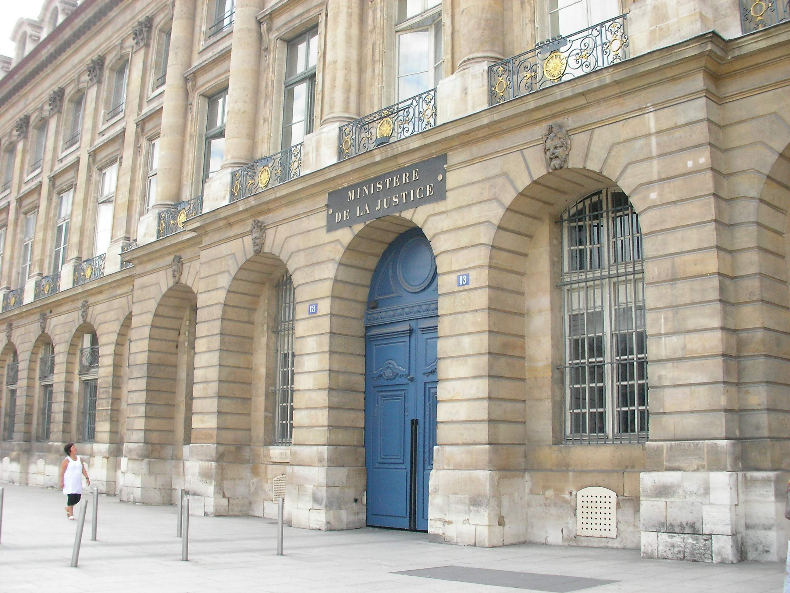 Ministère de la Justice sur la place Vendôme à Paris (Île-de-France, France).